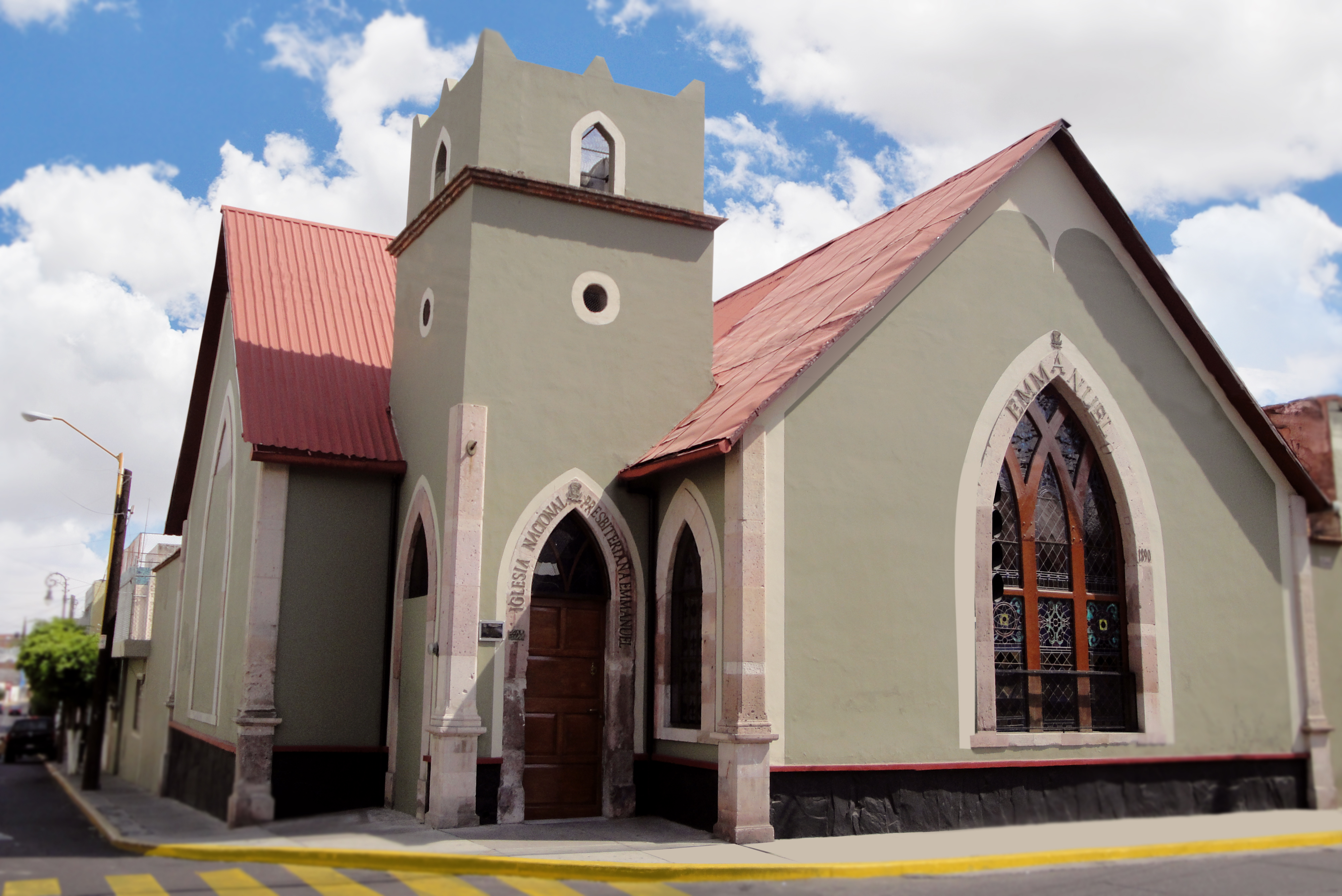 Iglesia Nacional Presbiteriana "Emmanuel" de Aguascalientes, Ags. fue fundada en 1890 por Misioneros que acompañaban a los ingenieros americanos que llegaron para construir el ferrocarril (Hoy Plaza de las tres Centurias)